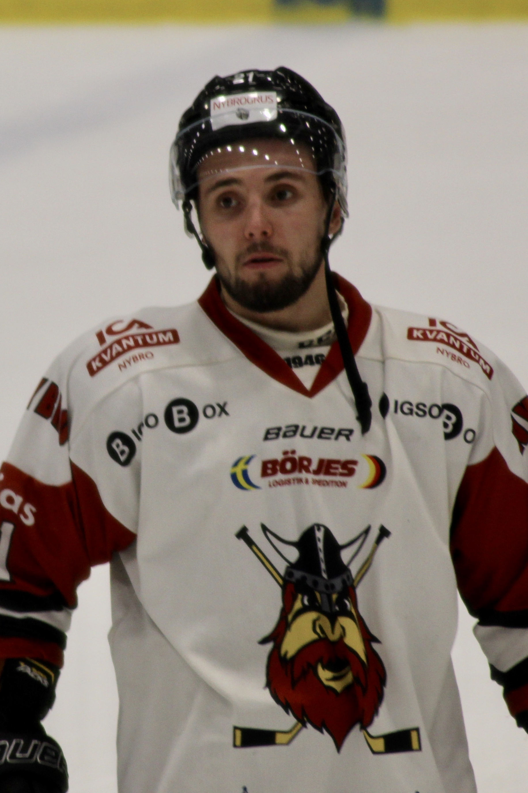 Janne Kivilahti, Nybro Vikings IF i Halmstad Arena 2018-10-12 (